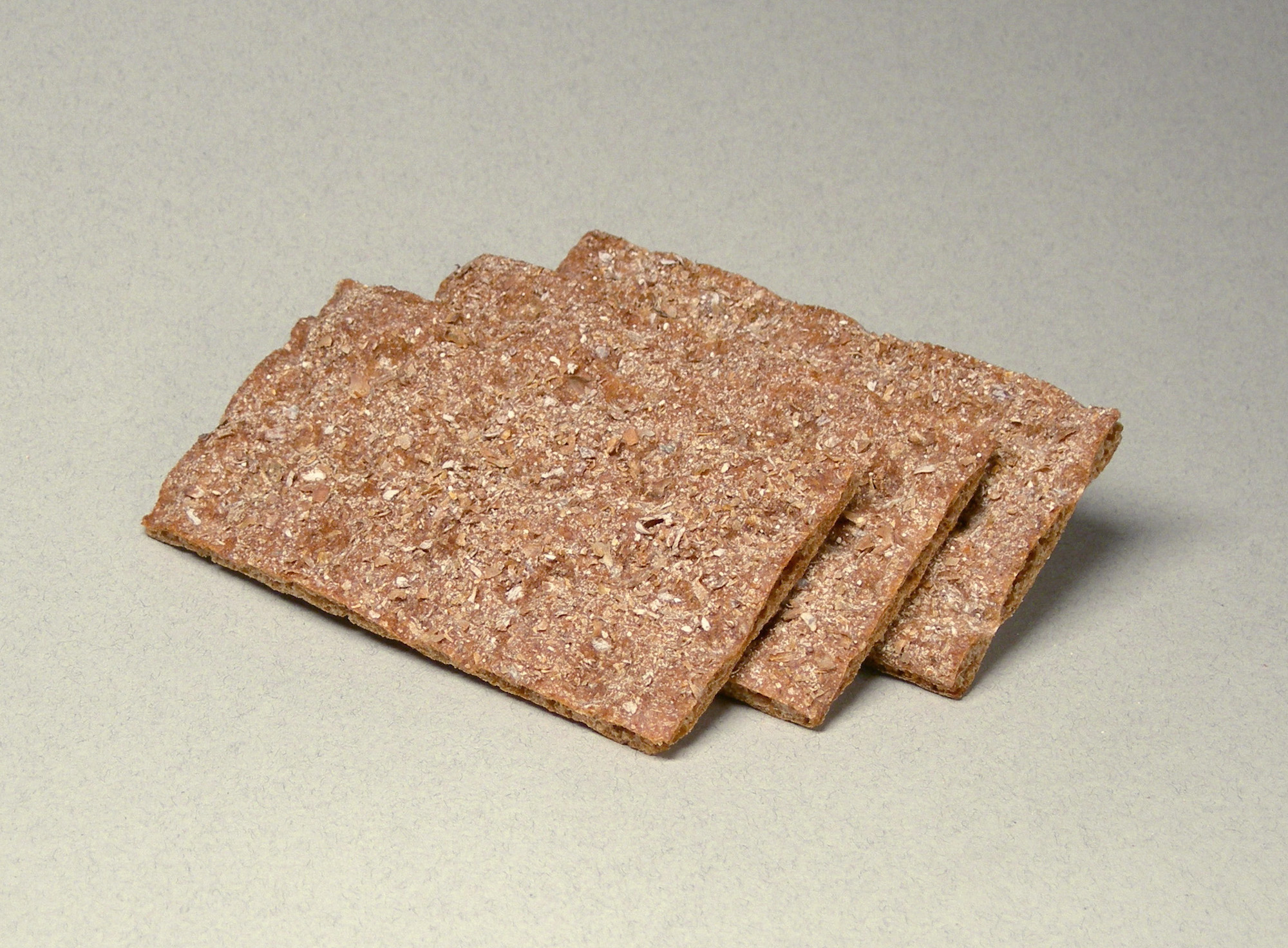 Knäckebrot. Eigene Aufnahme.